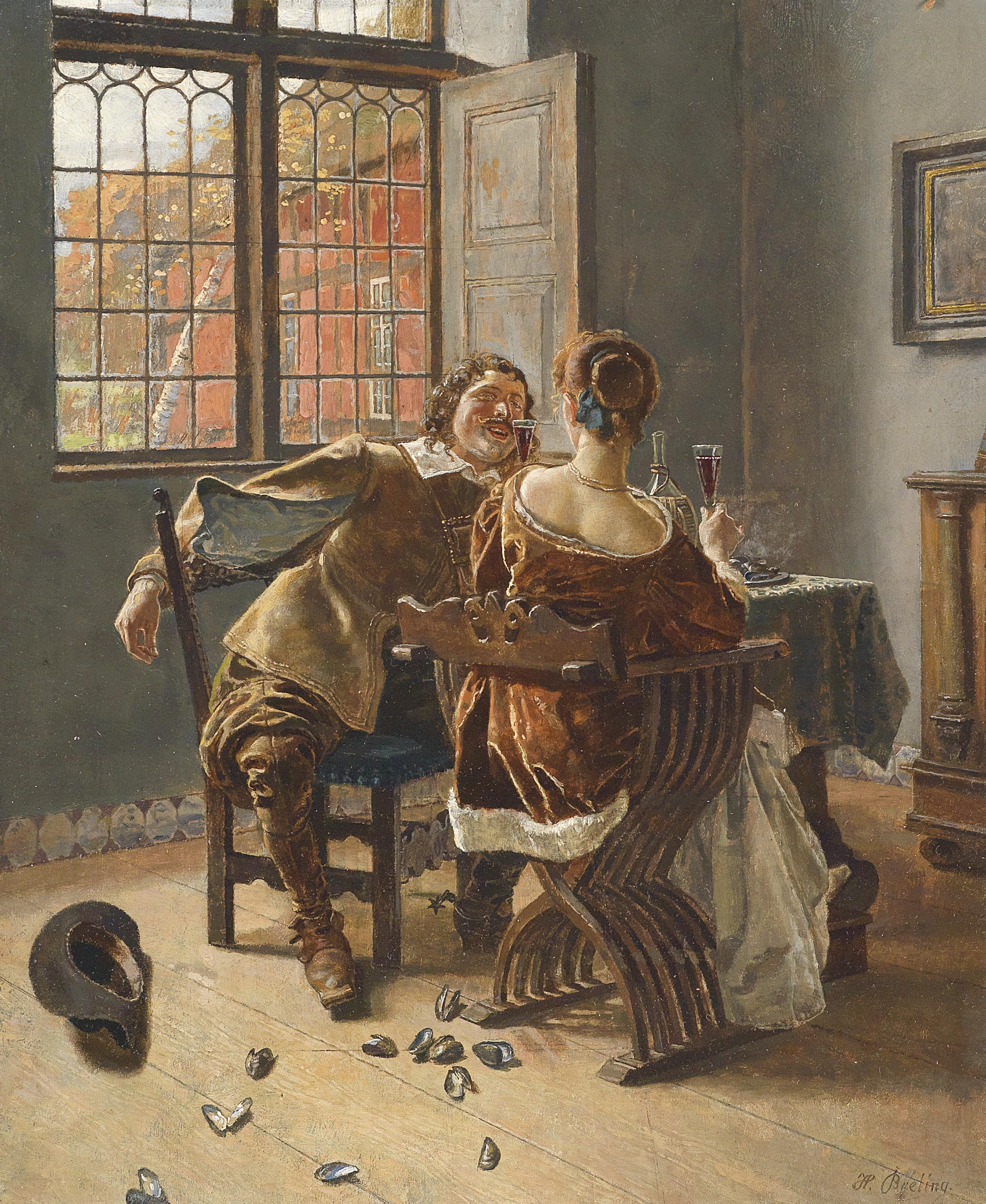 Das Festmahl, signiert H. Breling, Öl auf Holz, 28,5 x 24 cm